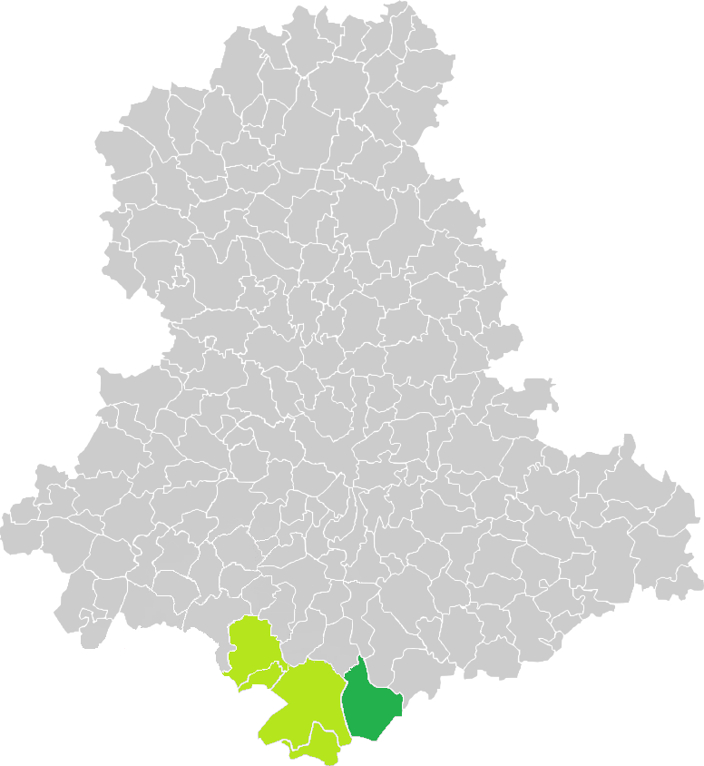 Carte de situation de la commune de Coussac-Bonneval (en vert foncé) dans le votre Canton (en vert clair) sur une carte des communes de la Haute-Vienne